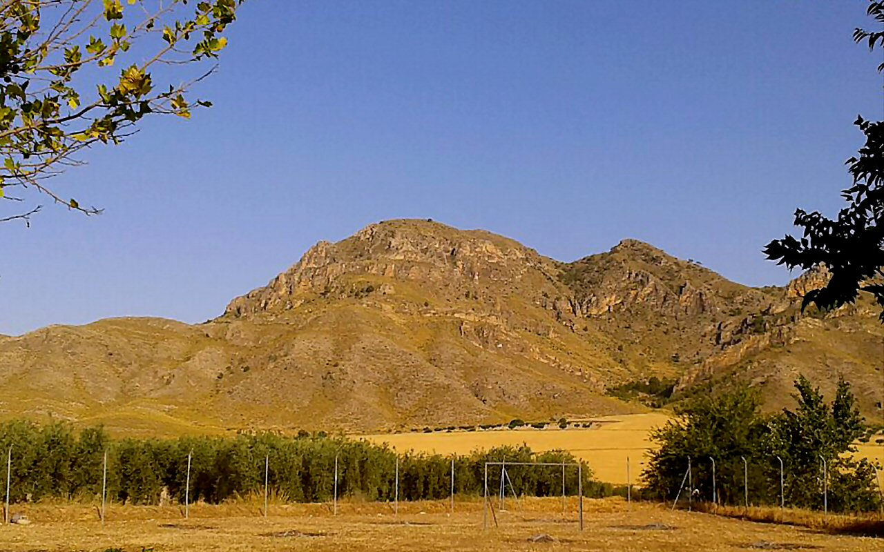 Pico del Maestre. Jumilla. En la parte media de su ladera se ubica el Complejo ibérico de Coímbra del Barranco Ancho